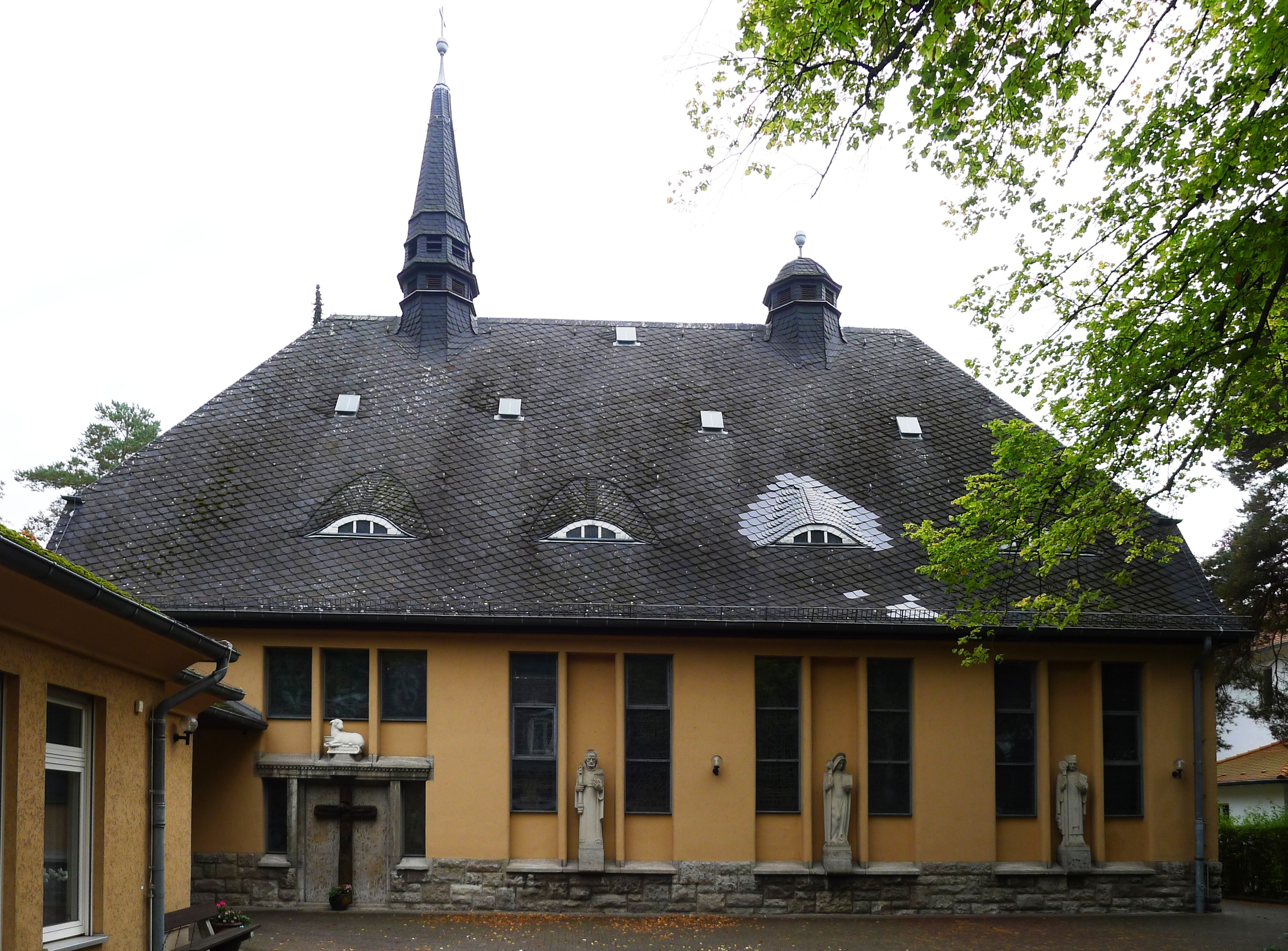 Kirchenschiff vom Hof gesehen